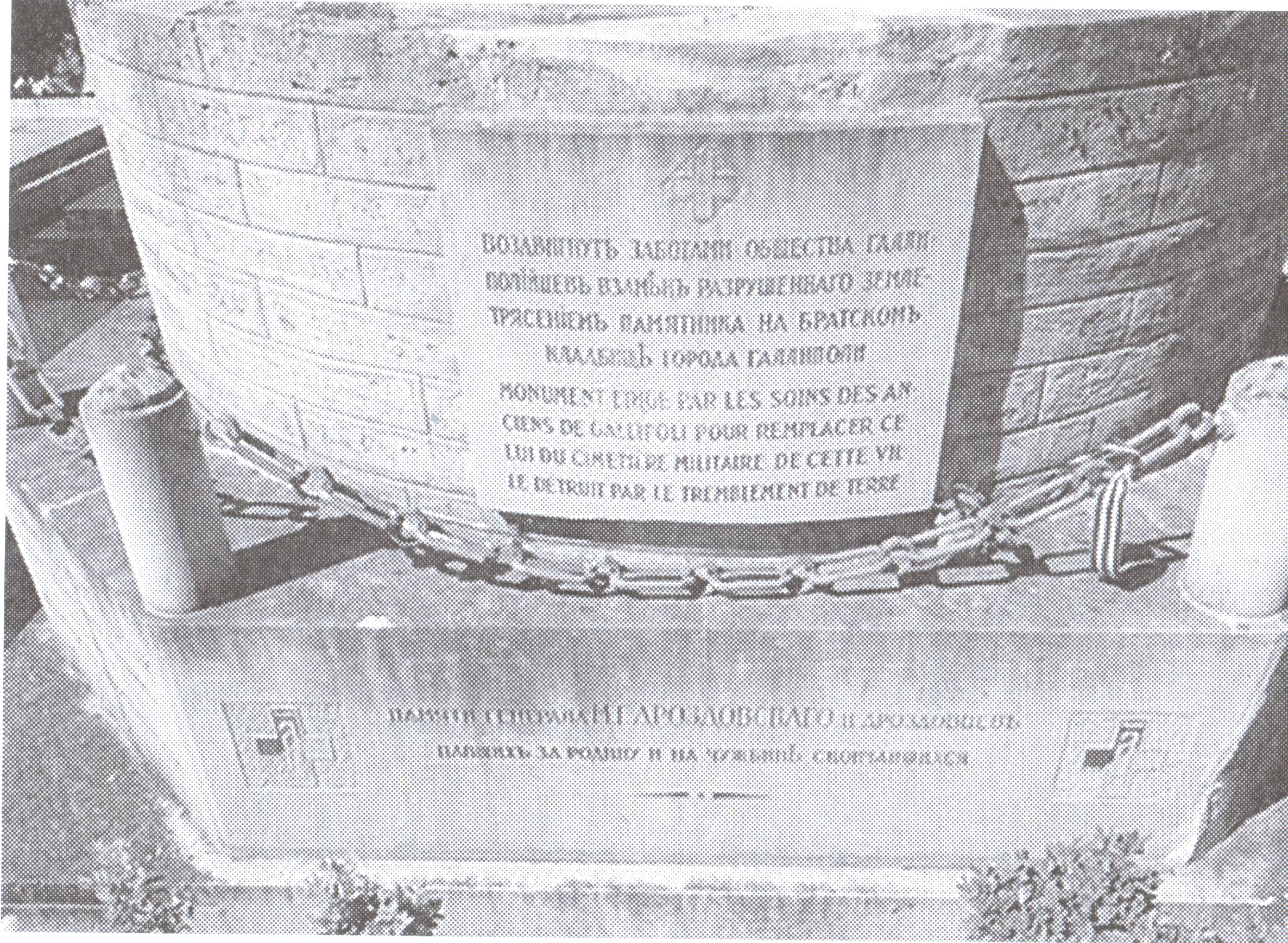 Памяти генерала М.Г. Дроздовского и дроздовцев, павших за Родину и на чужбине скончавшихся. Галлиполи